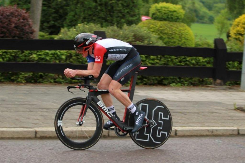 Stefan Küng, Goldmedail beim Zäitfueren